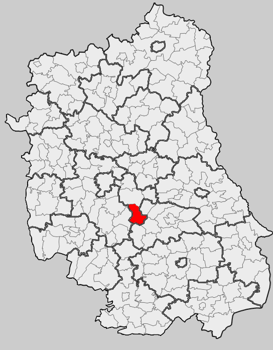 Map of gmina Rybczewice, Świdnik county, Lublin voivodship Mapa gminy Rybczewice, powiat świdnicki, województwo lubelskie